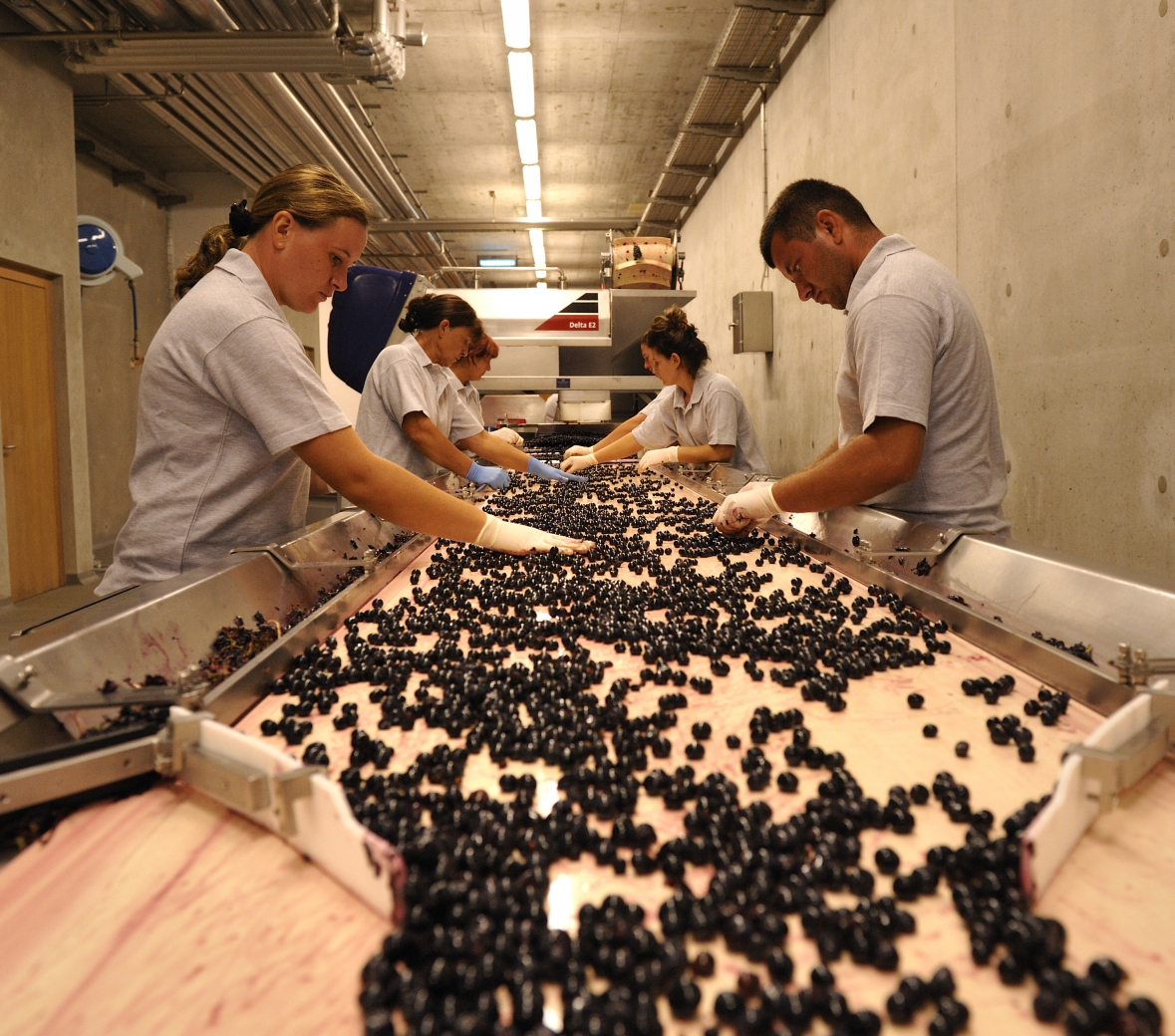 Sortiertisch von Monteverro Weingut